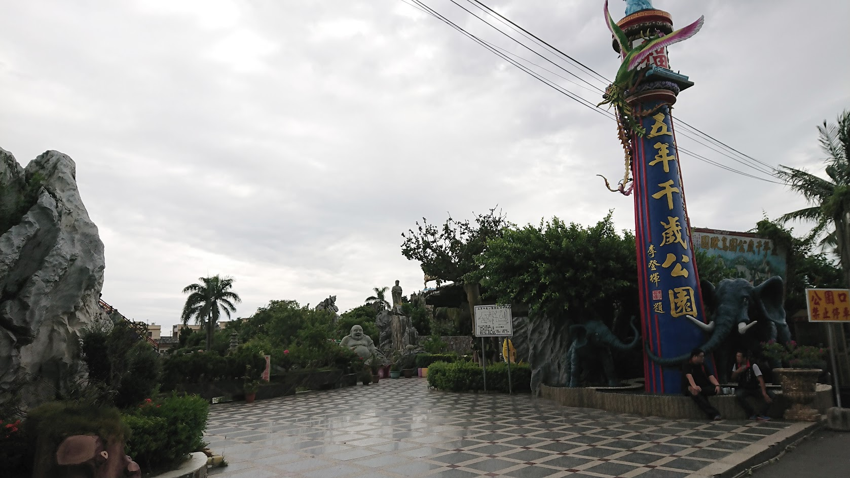 褒忠鄉馬鳴山五年千歲公園入口處